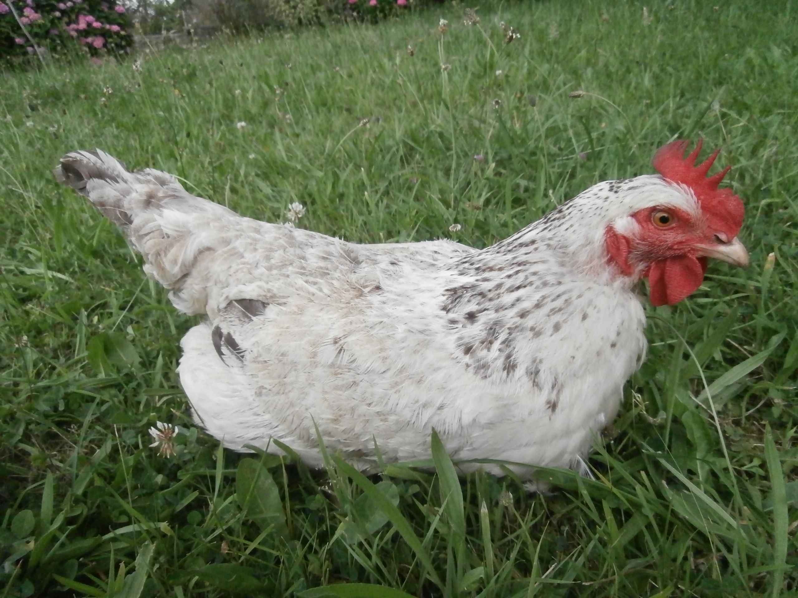 Gallina adulta de la raza española murciana